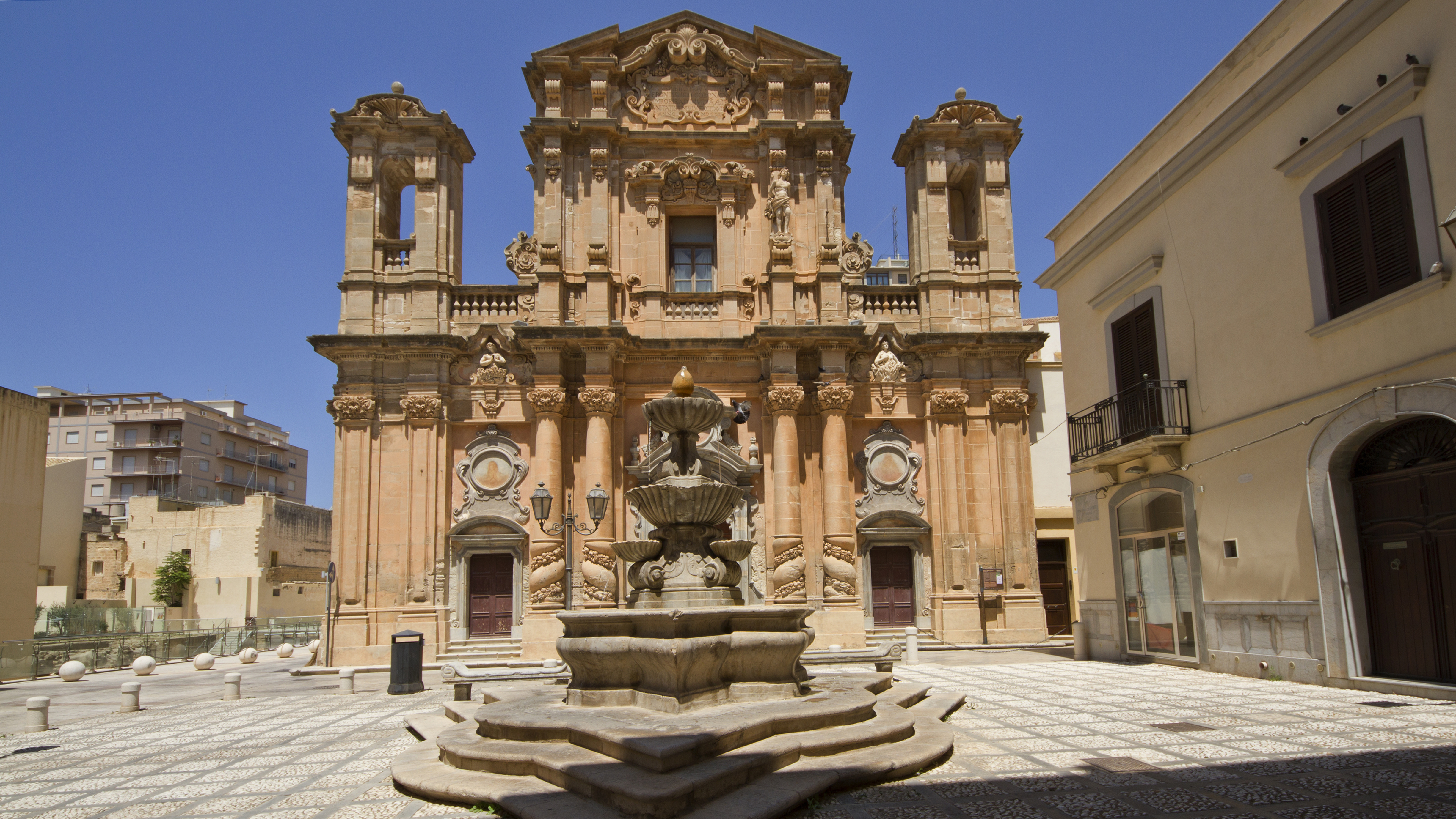 La Chiesa del Purgatorio di Marsala, Sicily, Italy